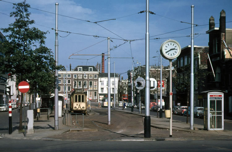 De Haagse Turfmarkt in 1964